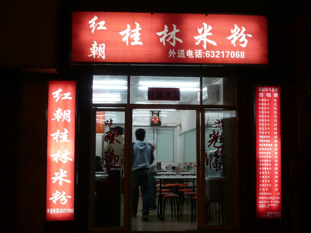 中文（中国大陆）: 上海一家桂林米粉店